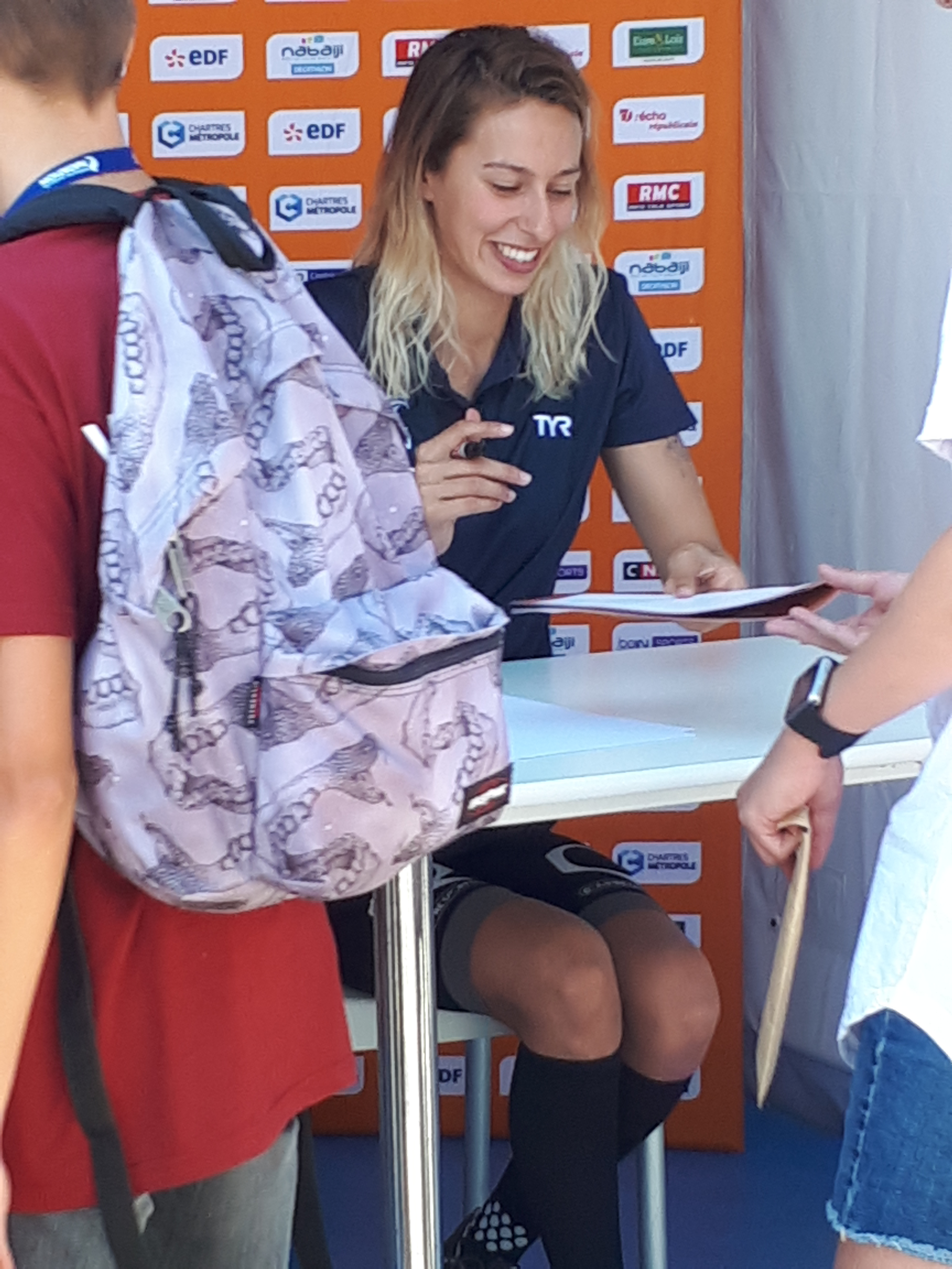 Open de France de Natation 2018 à Chartres. Fantine Lesaffre pendant la séance de dédicaces.